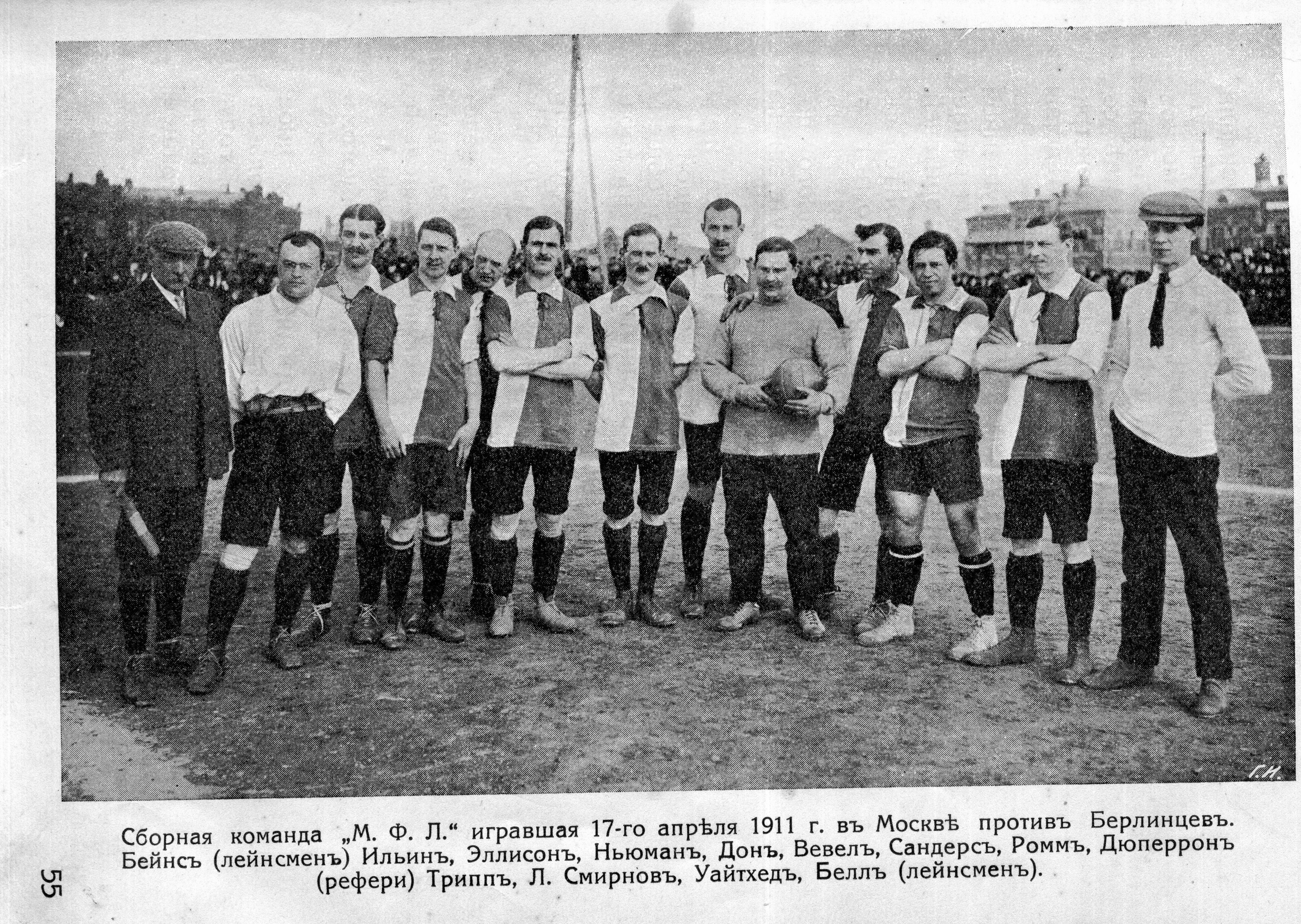 Сборная команда Московской футбольной лиги 17 апреля 1911 года. Состав: Бейнс (лайнсмен), Ильин, Эллисон, Ньюман, Дон, Вевел, Сандерс, Ромм, Дюперрон (рефери), Трипп, Л. Смирнов, Уайтхед, Белл (лайнсмен).